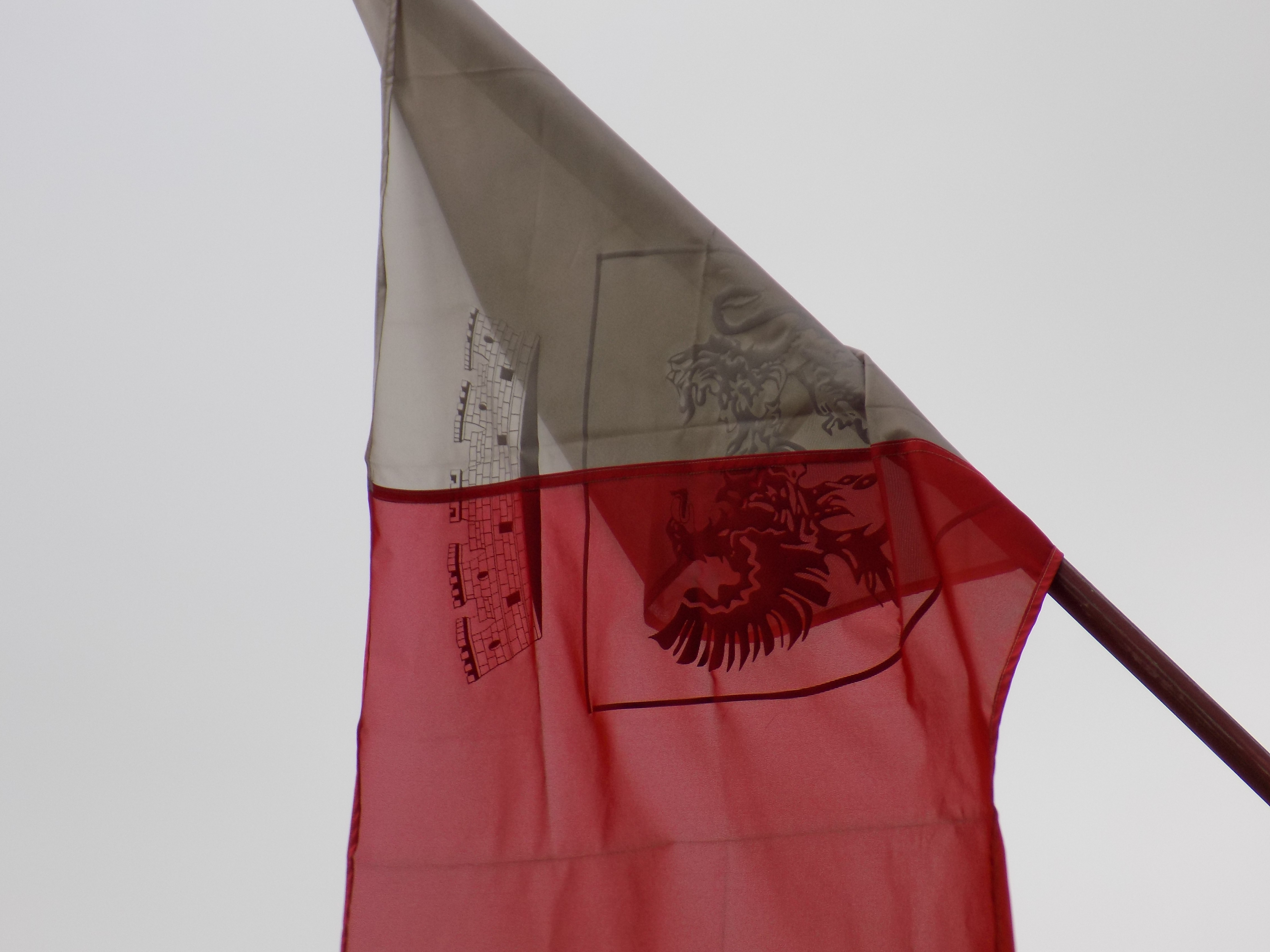 Flagge